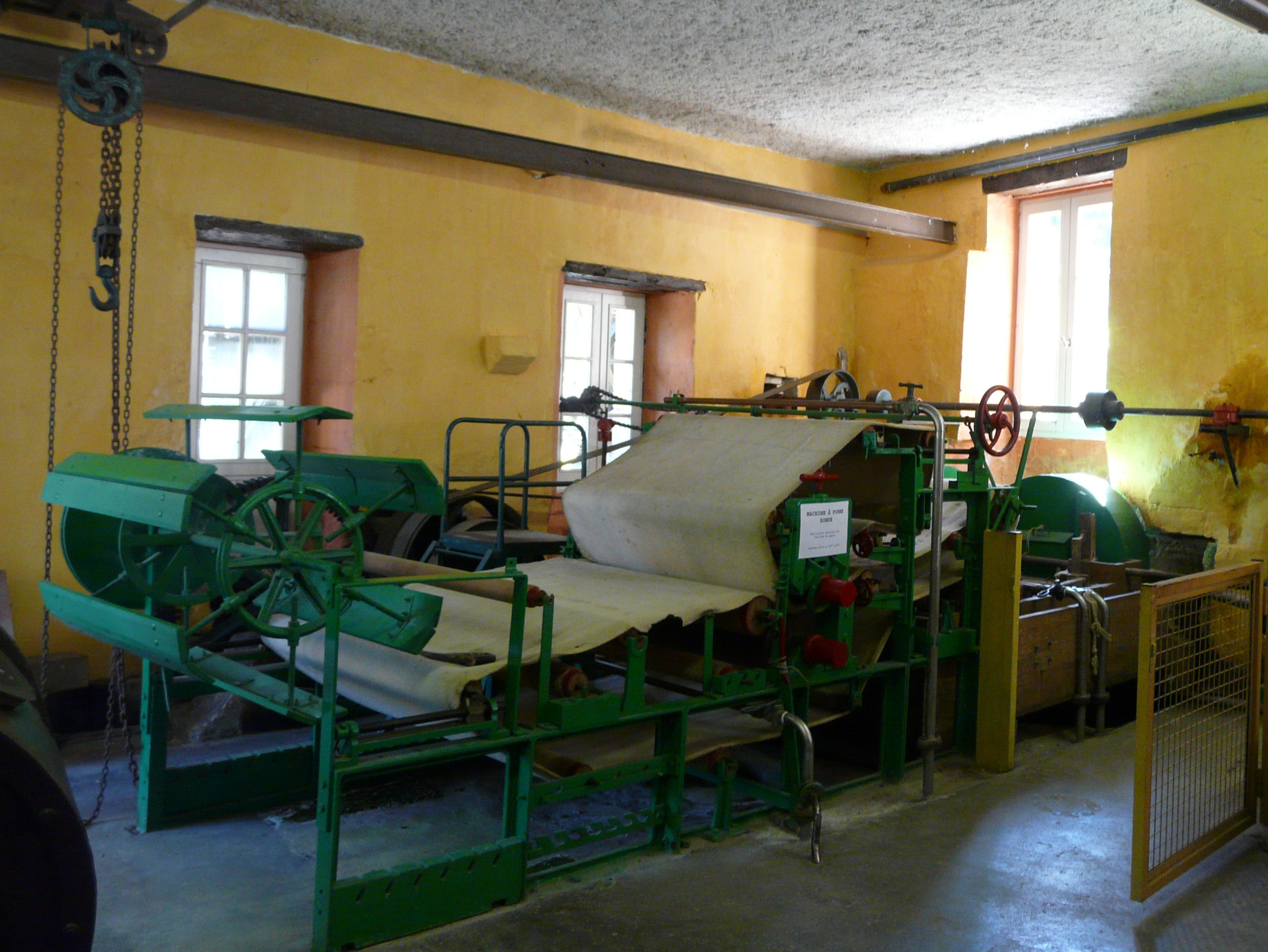 Machine à forme ronde du XIXe siècle, moulin de la Rouzique, Couze-et-Saint-Front, Dordogne, France.